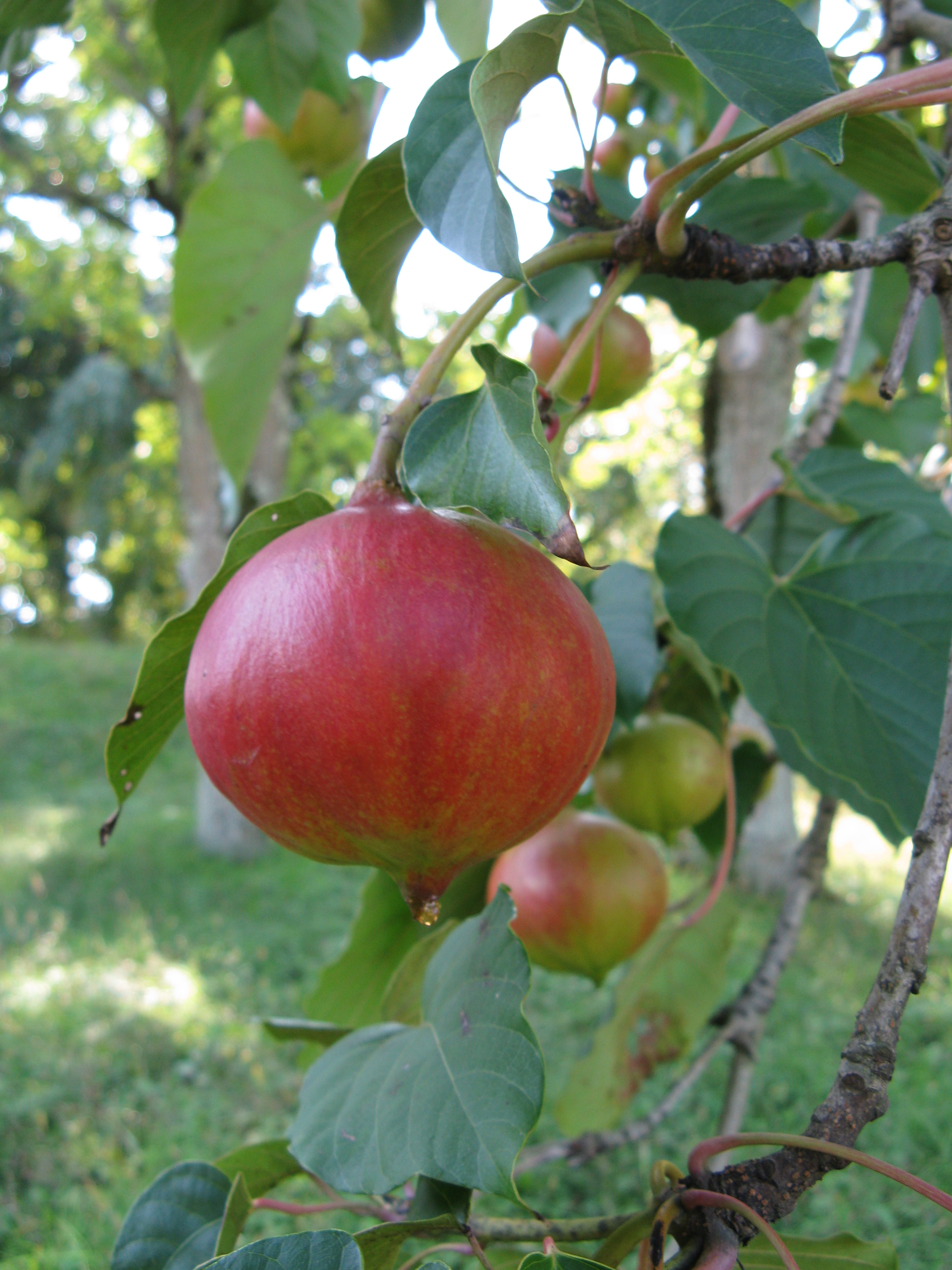 Scientific name Vernicia fordii